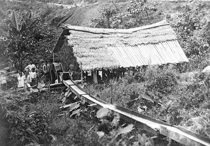 Repronegatief. Door water gedreven rijststampmolen bij Kota-Baroe, Benkoelen